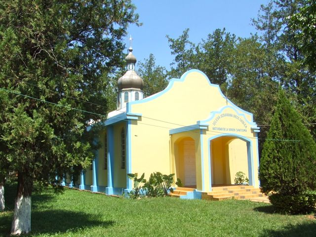 Iglesia Grecorromana Ucraniana de Carmen del Paraná, Departamento de Itapúa, Paraguay.